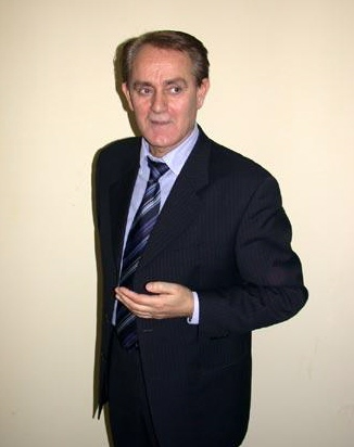 Kemal Maločić